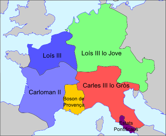 Partiment de l'Empèri Carolingian vèrs 880.